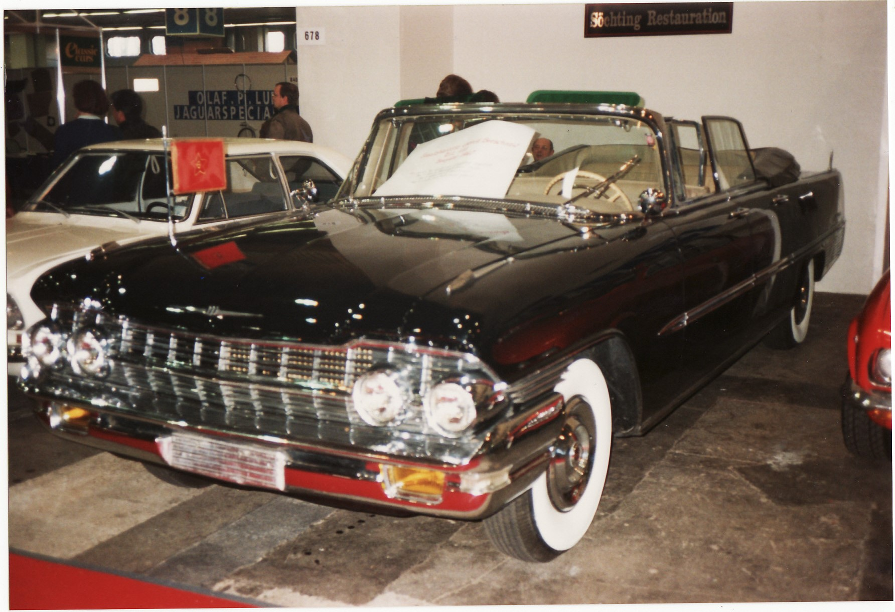 ZIL 111 D Convertible c.1963-66